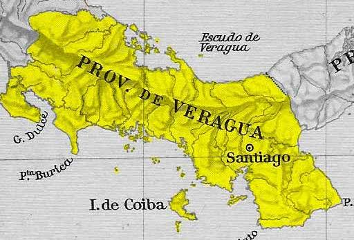 Mapa de la Provincia de Veragua en 1810 y 1830